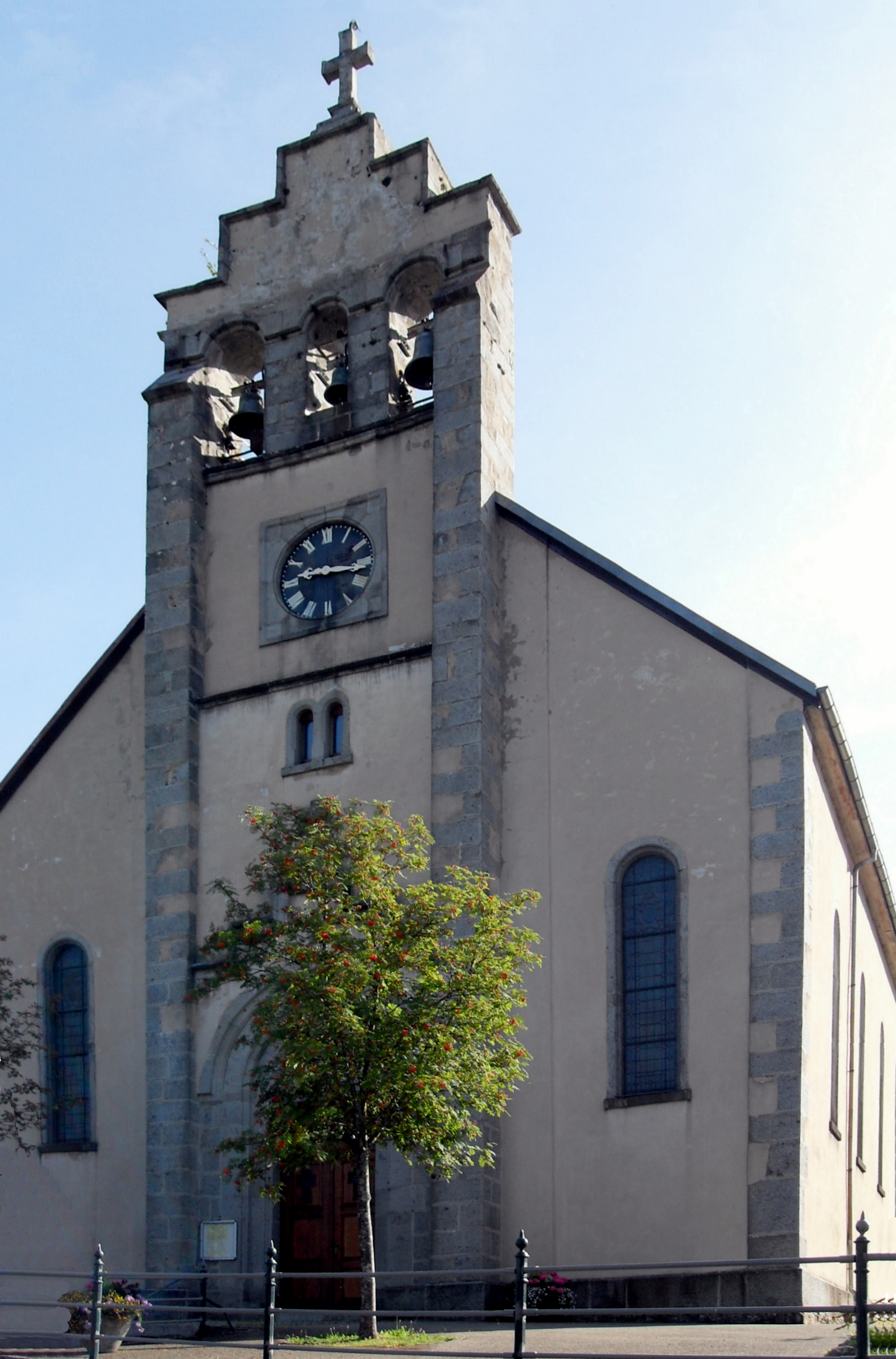 L'église Saint-Sébastien à Geishouse